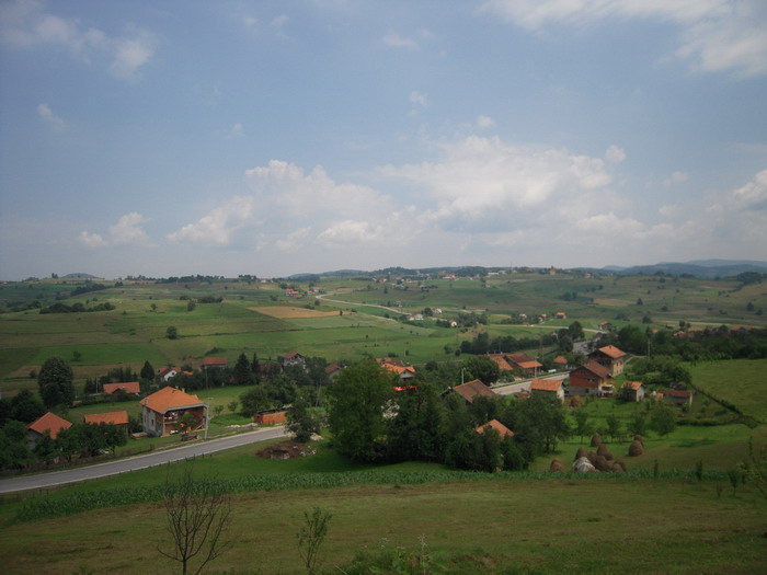 Pogled na Kola (Banja Luka)